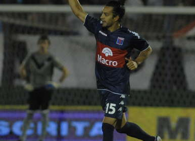 Gastón Díaz